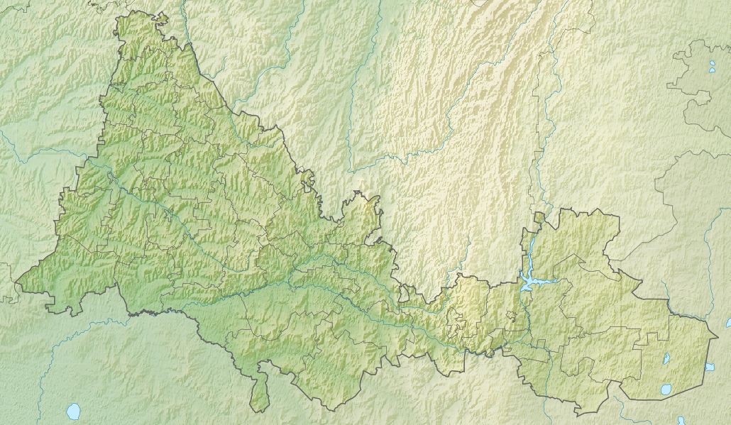 Физическая карта Оренбургской области, Россия. Координаты для GMT: -R50.54/61.9/50.42/54.46 Инструменты: GMT, Inkscape This map may be incomplete, and may contain errors. Don't rely solely on it for navigation.